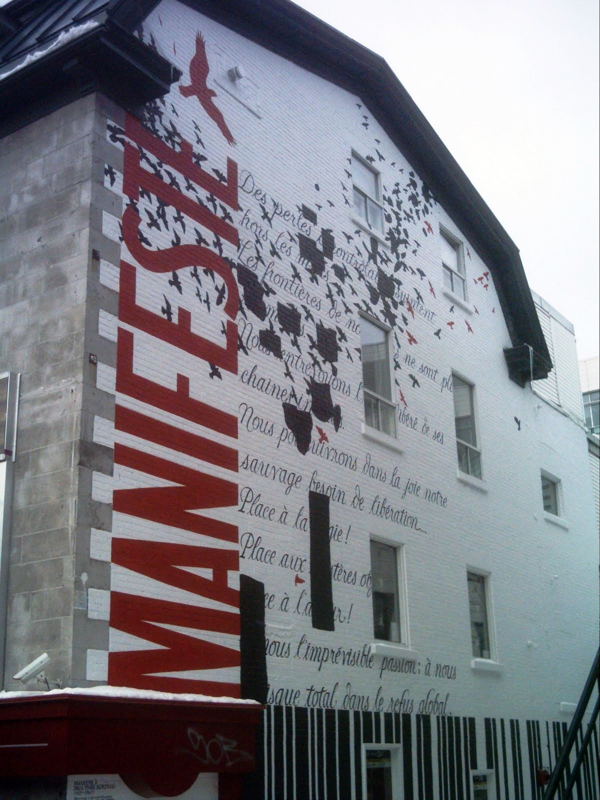 Murale de Thomas Csano et Luc Saucier produite par l'organisme MU, place Paul-Émile-Borduas, à Montréal